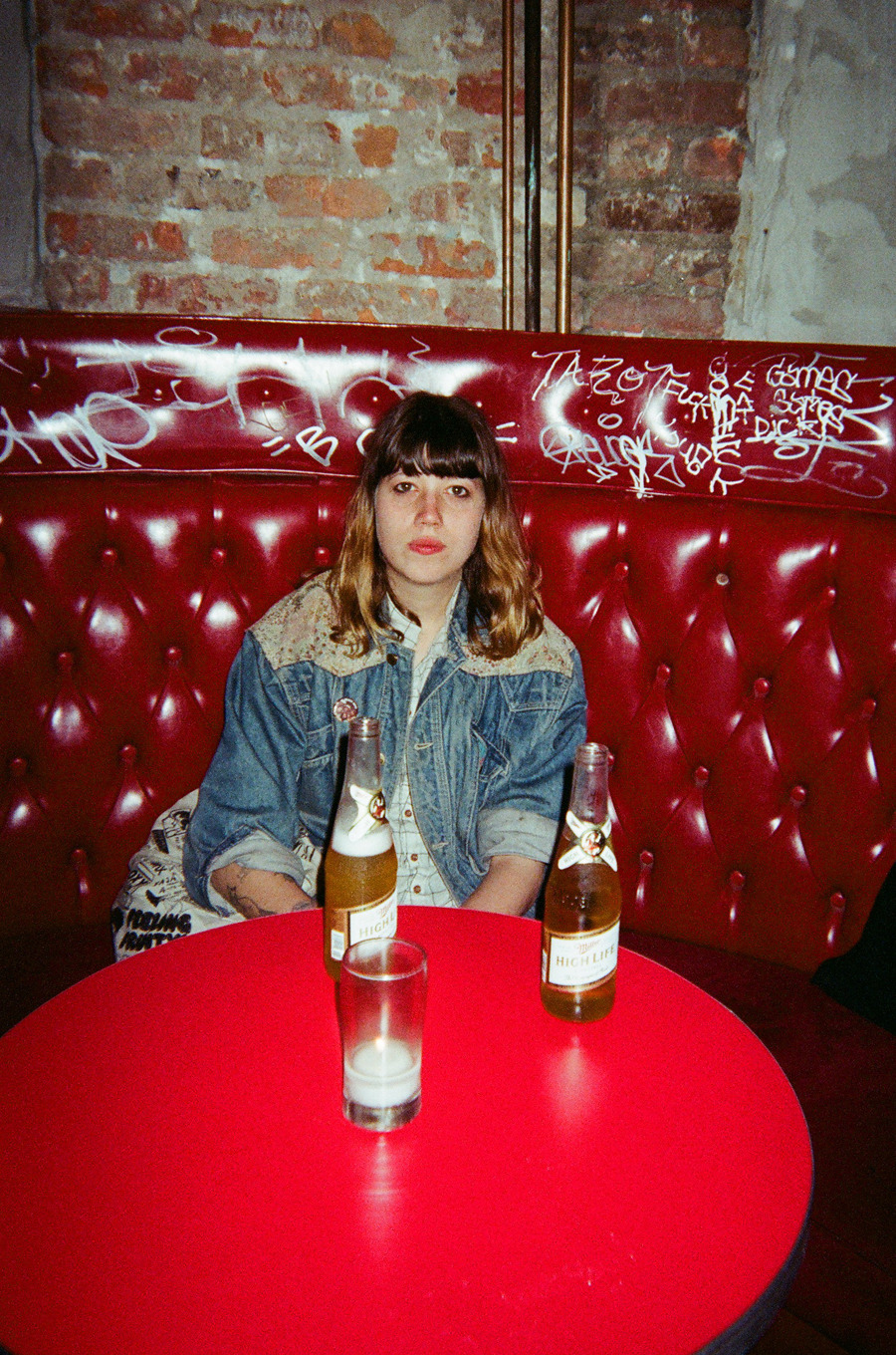 Cassie Ramone en un bar de Williamsburg, Nueva York